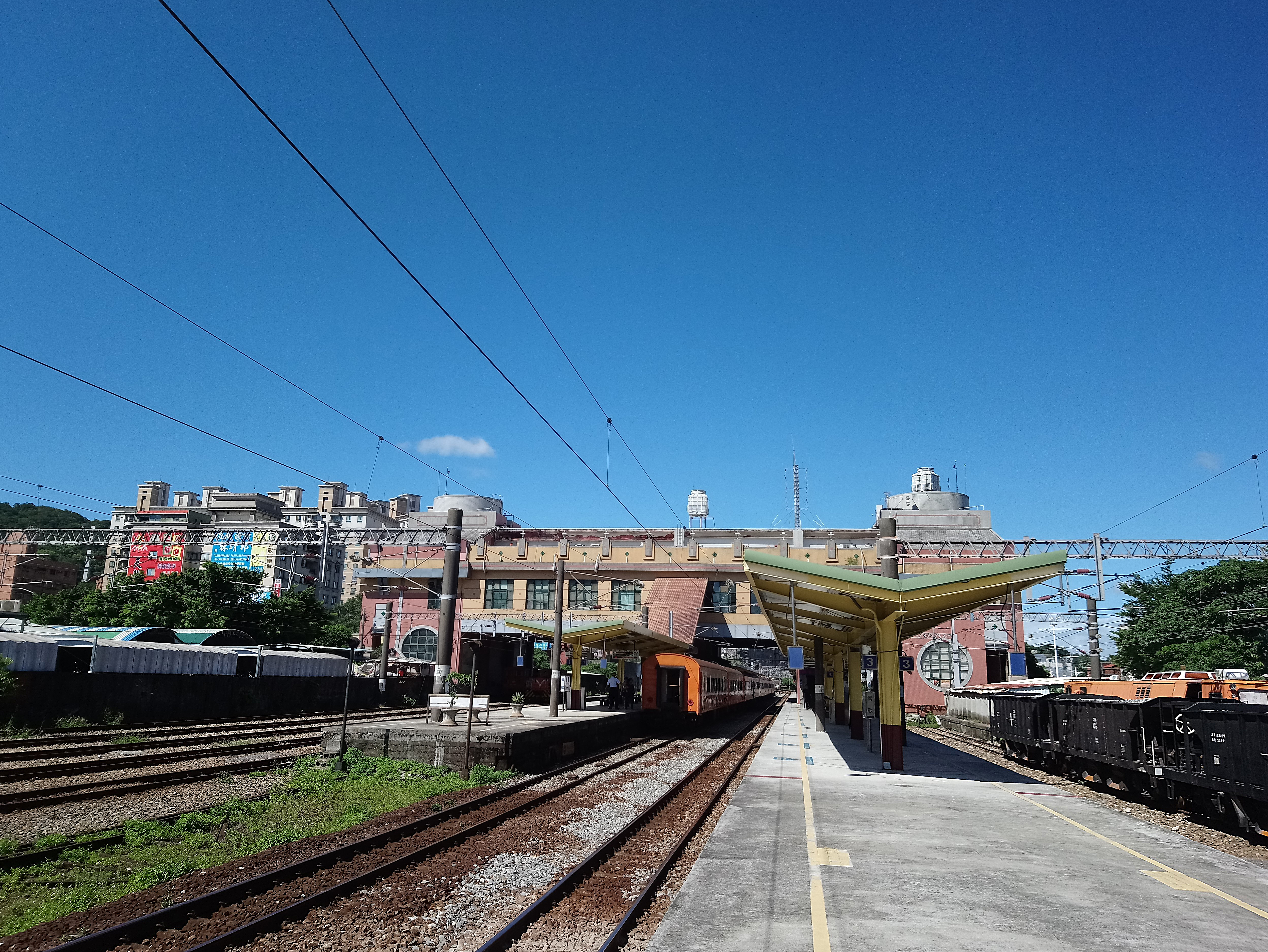 臺鐵鶯歌車站月臺,新北市鶯歌區中部地區東鶯里